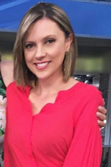 Presentadora y periodista colombiana